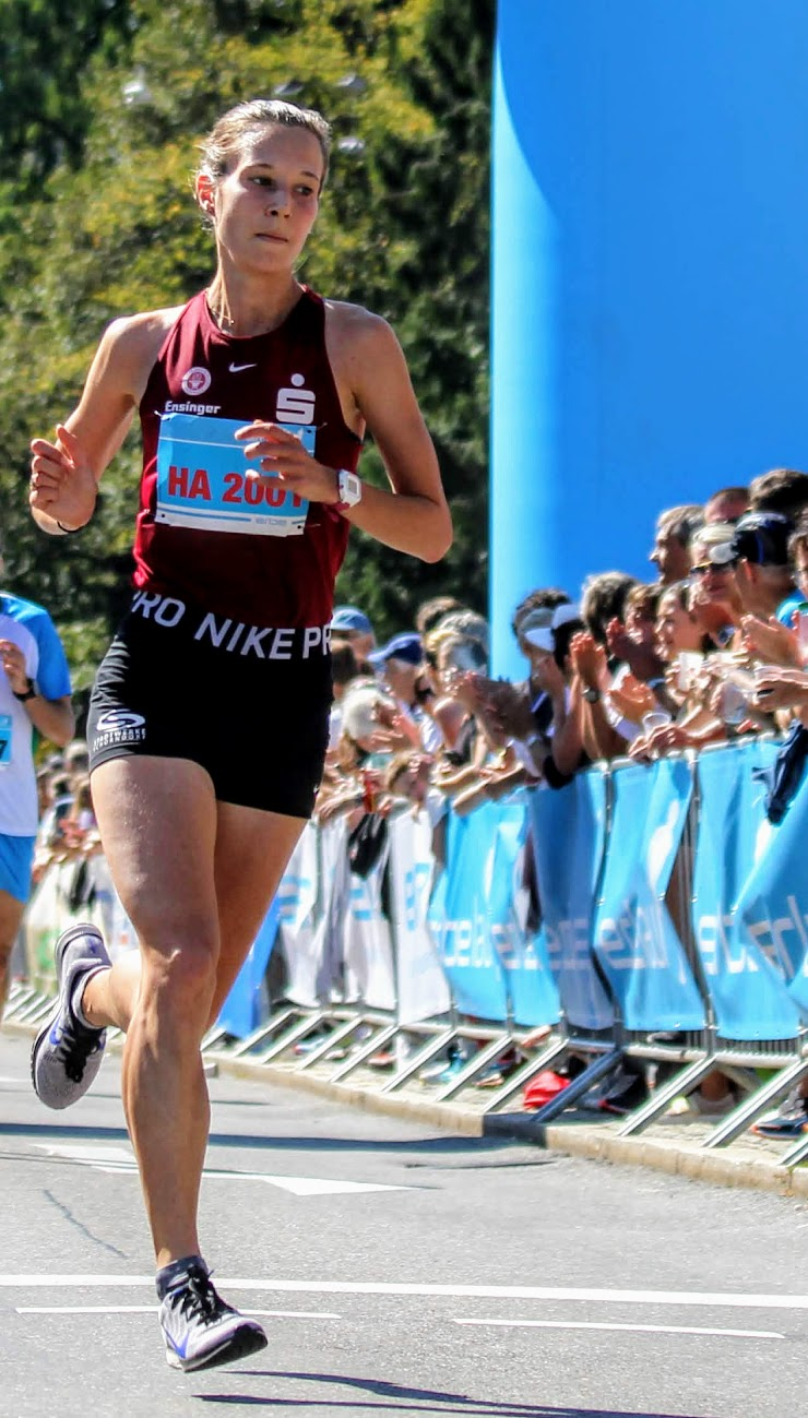 Hanna Klein siegt beim 26. Tübinger Erbe-Lauf 2019 über 10 Kilometer.